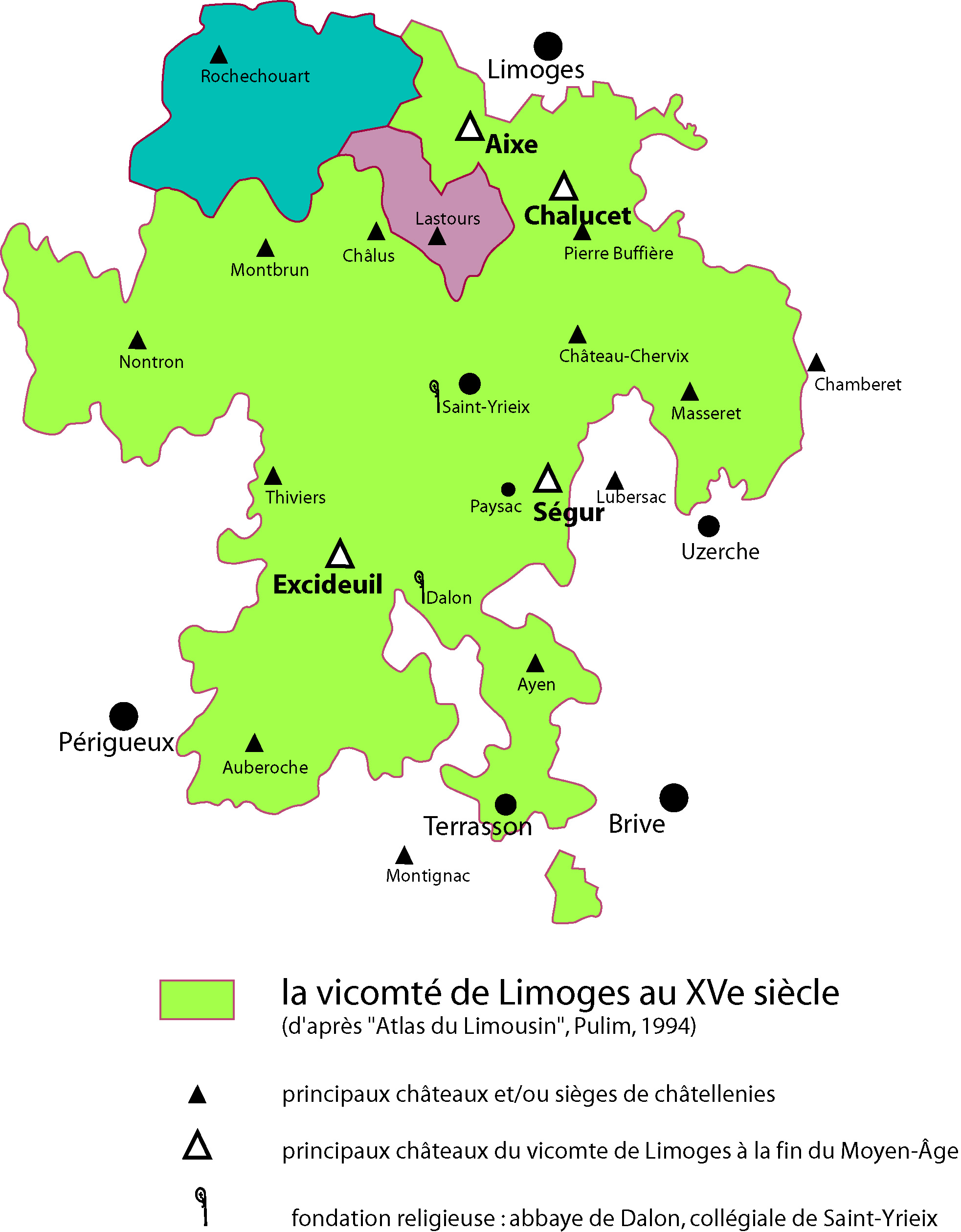 map of Limoges viscounty XVe siècle, carte de la vicomté de Limoges, carta de la vicontat de Lemotges